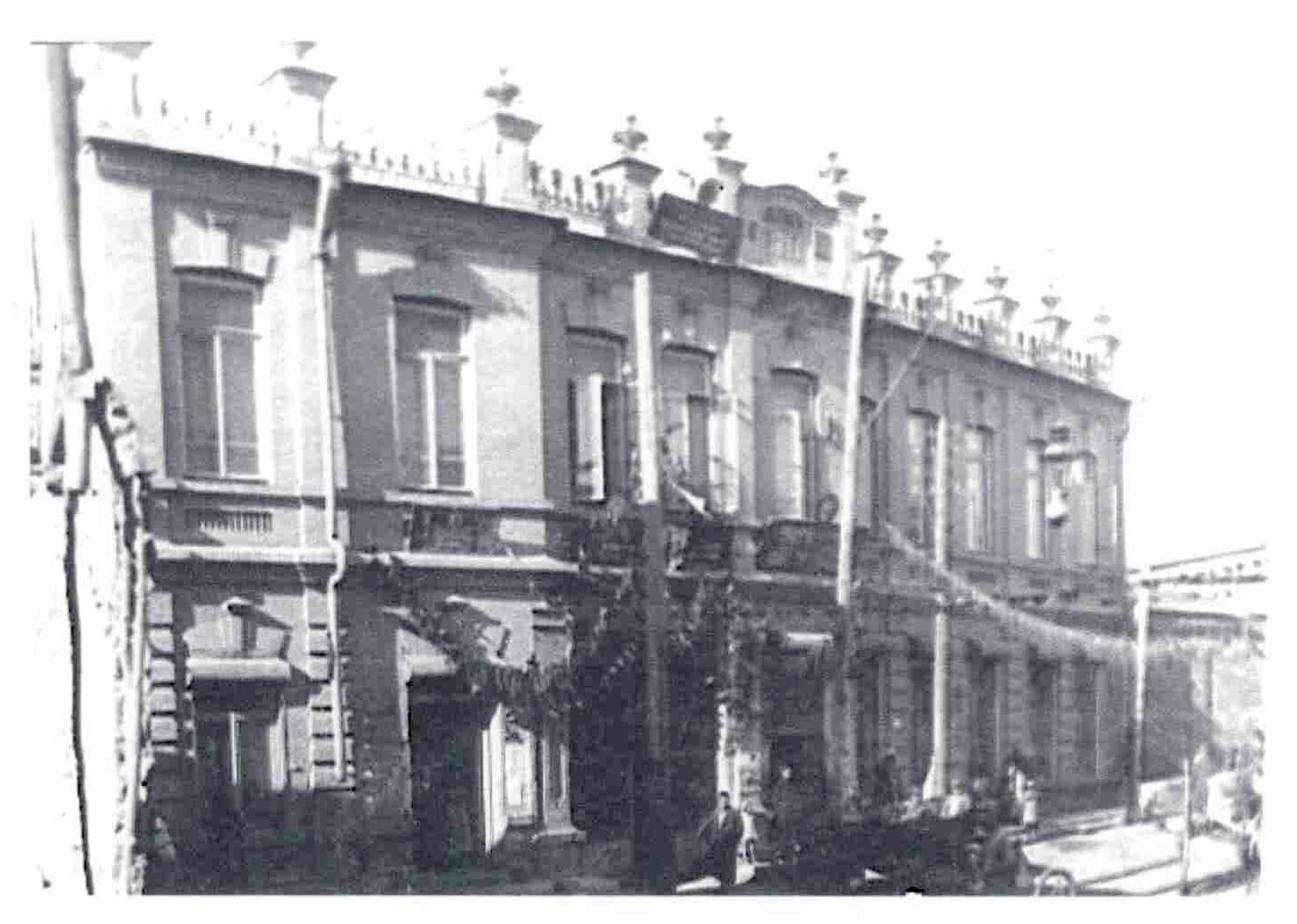 Здание на которой можно прочитать аббревиатуру "Домъ Бр.Ш" и дату сооружения "1911"